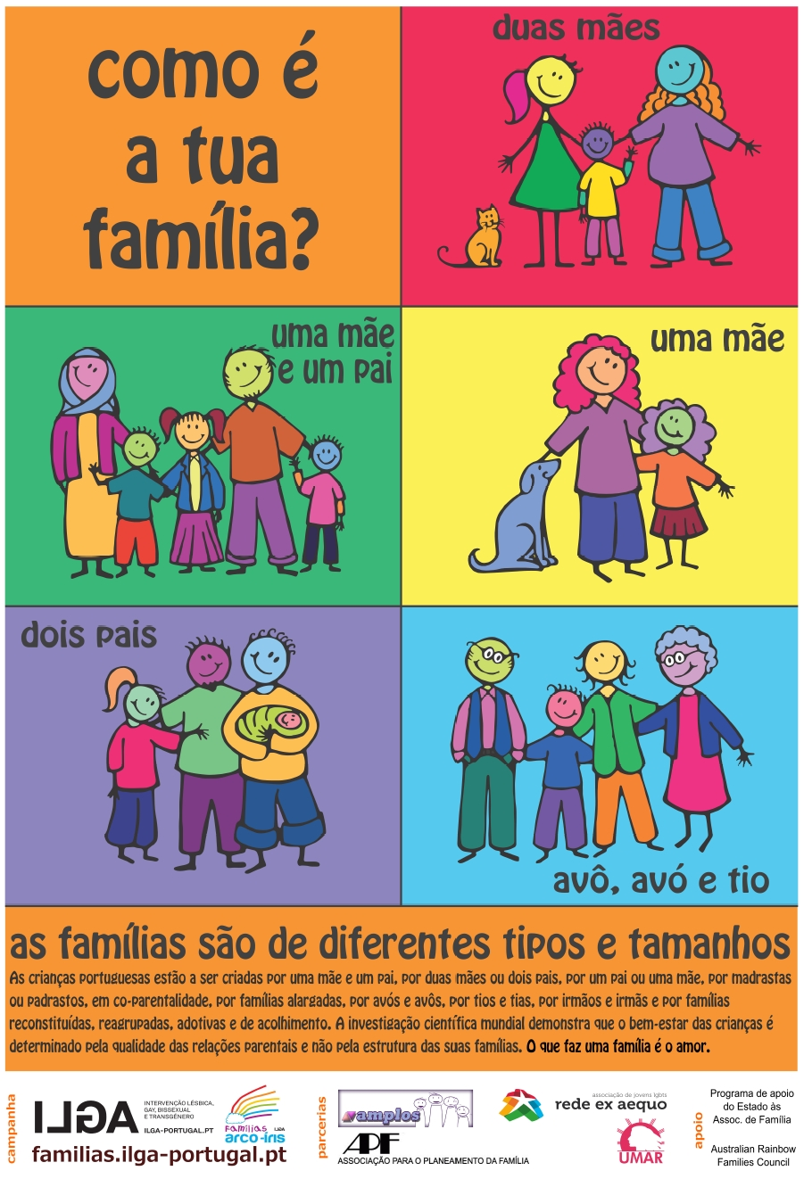 Poster com vários tipos de estruturas familiares para sensibilizar para a atual diversidade estrutural das famílias, como famílias monoparentais, homoparentais e adotivas